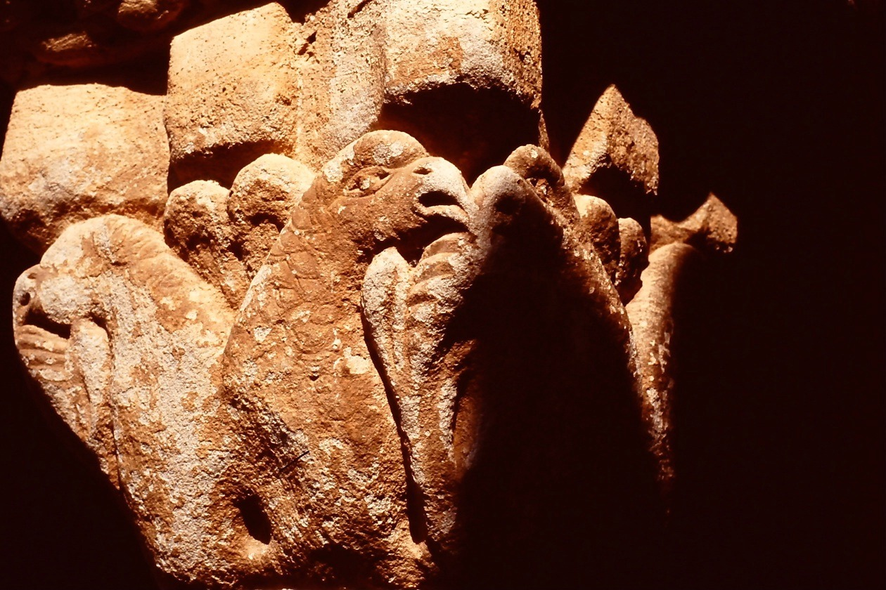 Santa Maria de Lluçà, Kapitell im Kreuzgang, Vogelkopf